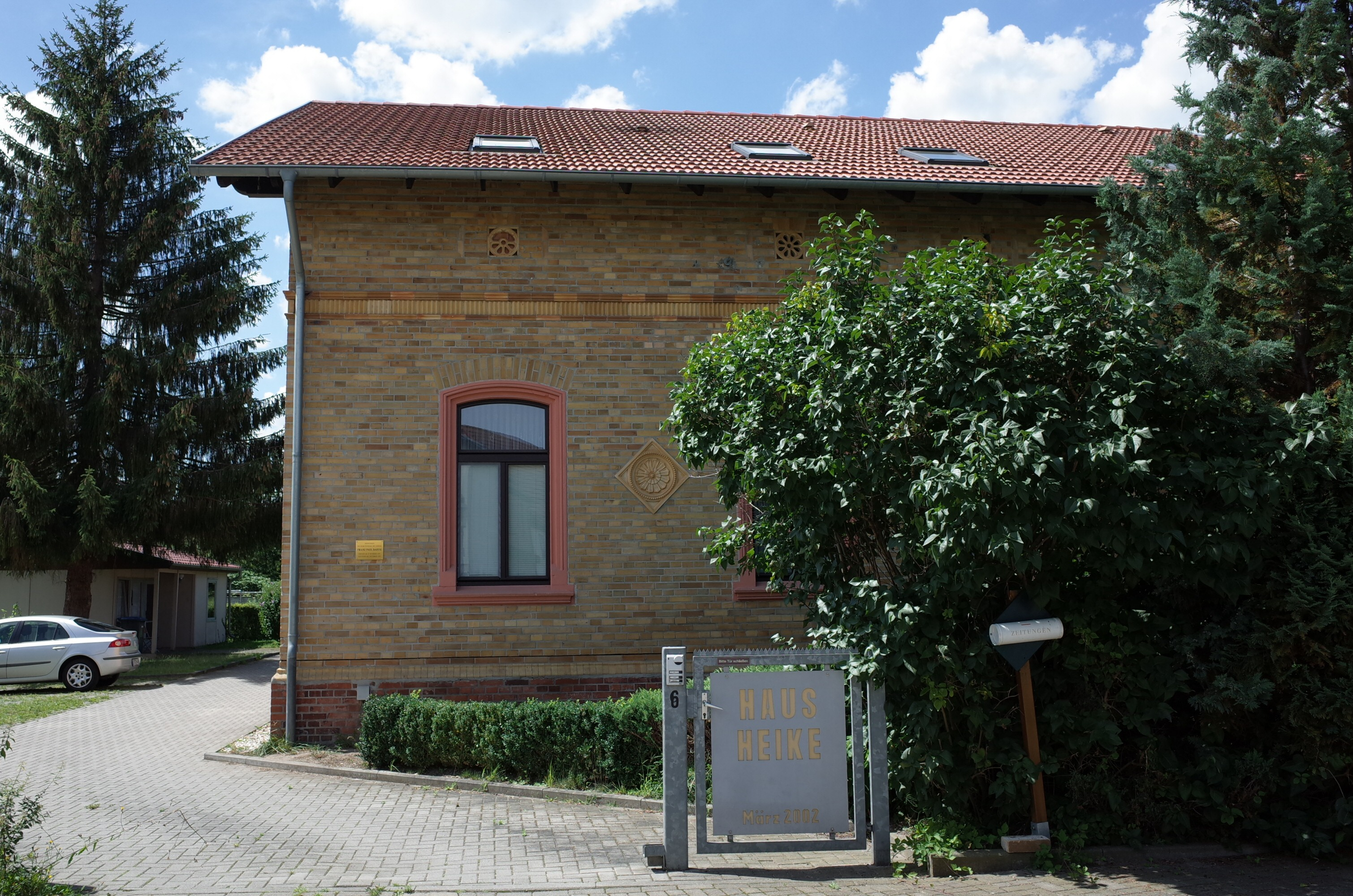 Raguhn-Jeßnitz, Ortsteil Jeßnitz,Neustadt 6. Innschrift auf der Tafel am Haus: Geburtshaus des Heimatdichters und Lehrers FRANZ PAUL BAEGE geboren am 25. November 1876 Gestorben am 2. November 1938